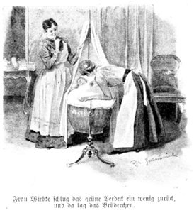 Illsutration from Richard Gutschmidt for "Lissy" by Bernhardine Schulze Smidt